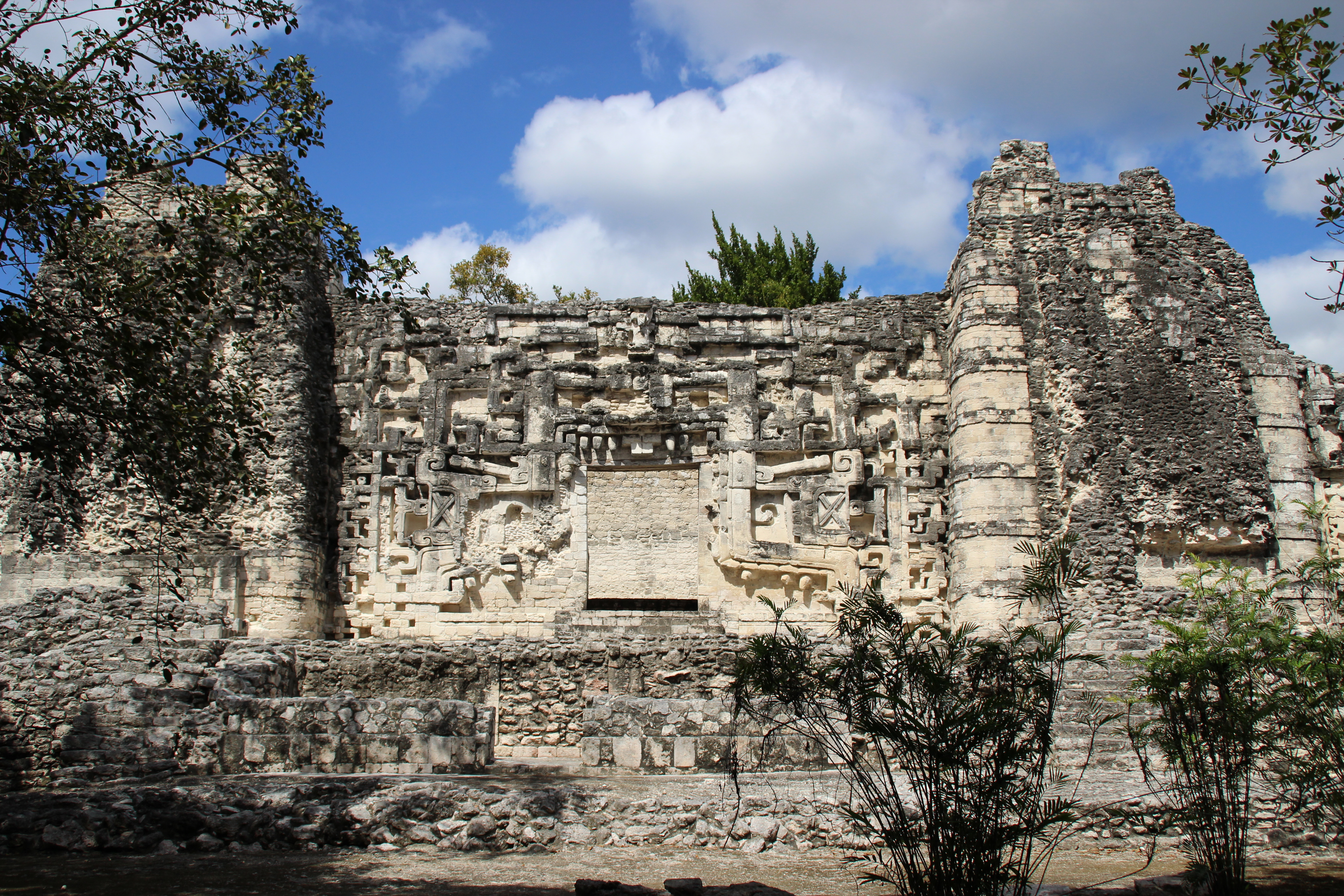 Fachada principal de la Estructura II de El Hormiguero, se aprecia la "Boca Monstruo" en la puerta central del edificio